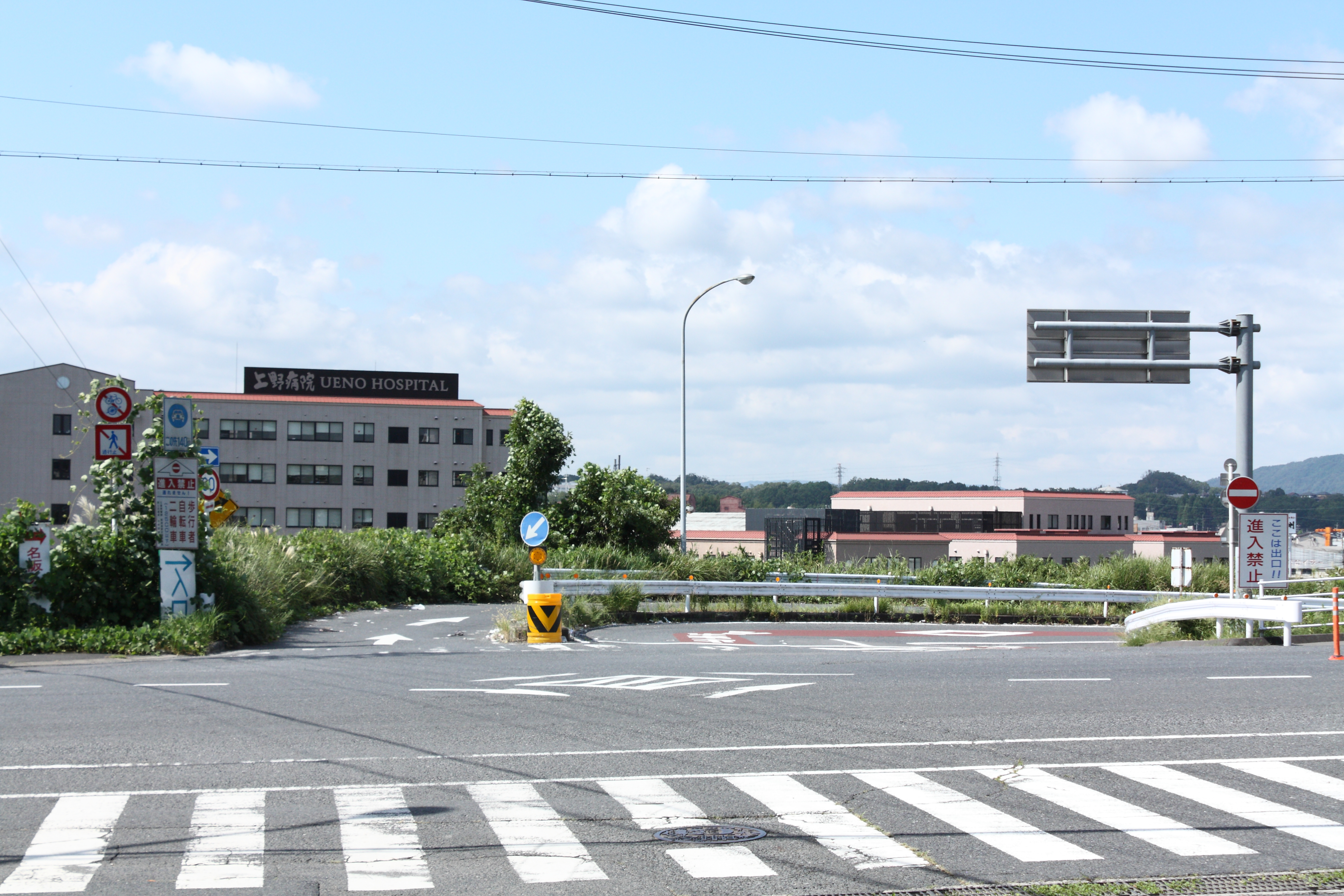 名阪国道 友生インターチェンジ（折畳みダイヤモンド型） 天理方面出入り口 三重県伊賀市下友生